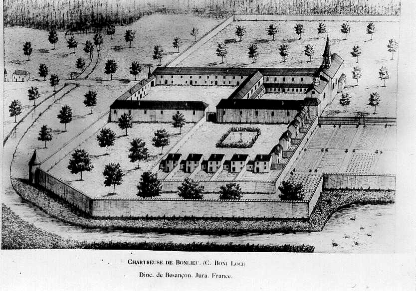 vue cavalière de la Chartreuse de Bonlieu au XVIIe siècle - reproduction du tableau placé dans la Grande Chartreuse de Savoie (Archives du département du Jura)